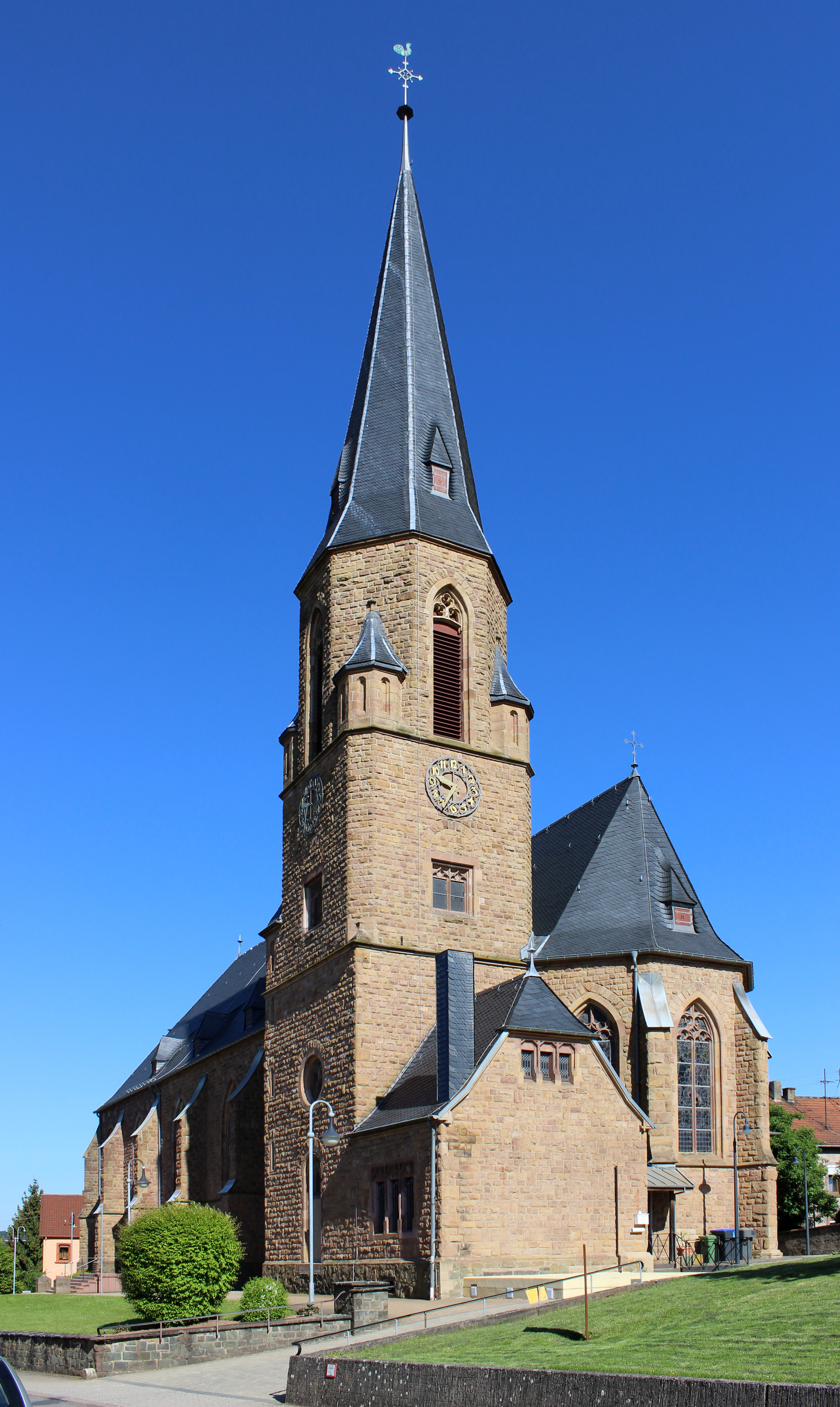 Die katholische Pfarrkirche Herz Jesu in Gresaubach, einem Stadtteil von Lebach, Landkreis Saarlouis, Saarland